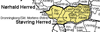 Støvring Herred Randers Amt Source: Map by Svend-Erik Christiansen